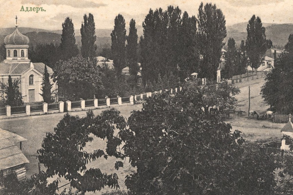 Адлер в 1910 году.